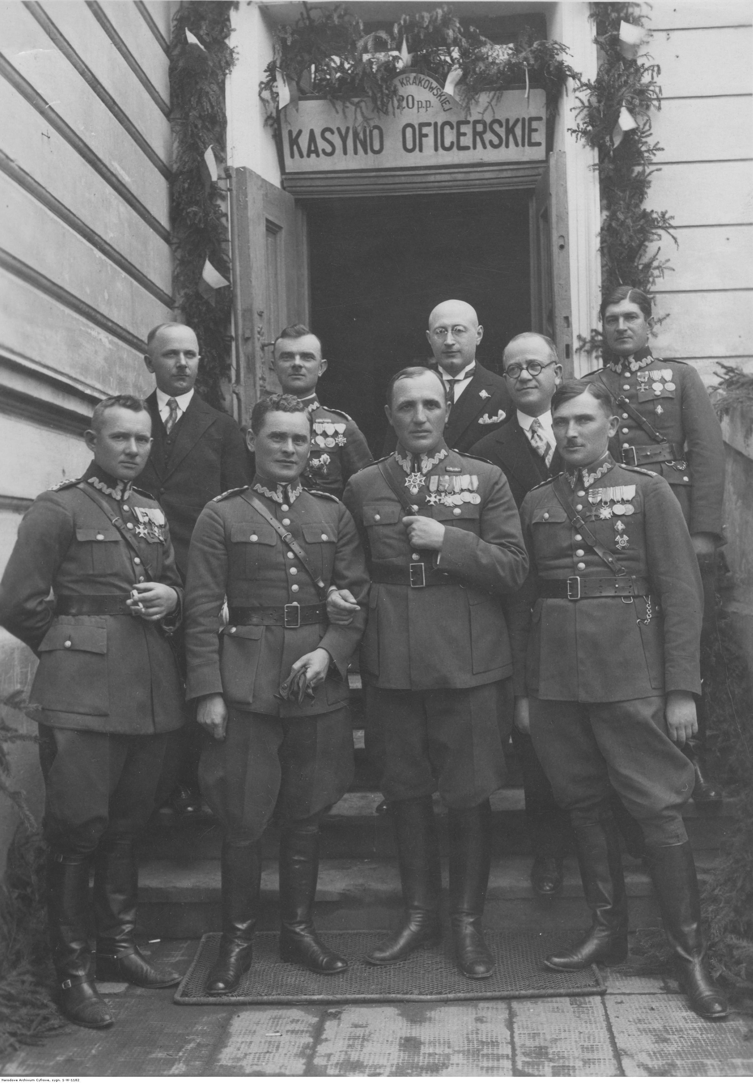 Organizatorzy 20 pułku piechoty przed kasynem oficerskim. W pierwszym rzędzie od lewej: kpt. Nowak, kpt. Markiewicz, płk Stanisław Kruk-Schuster, por. Warczewski. W drugim rzędzie m.in. kpt. Dworski, dr Godula, dr Jassem, Boczyner. Koncern Ilustrowany Kurier Codzienny - Archiwum Ilustracji. Sygnatura: 1-W-1182